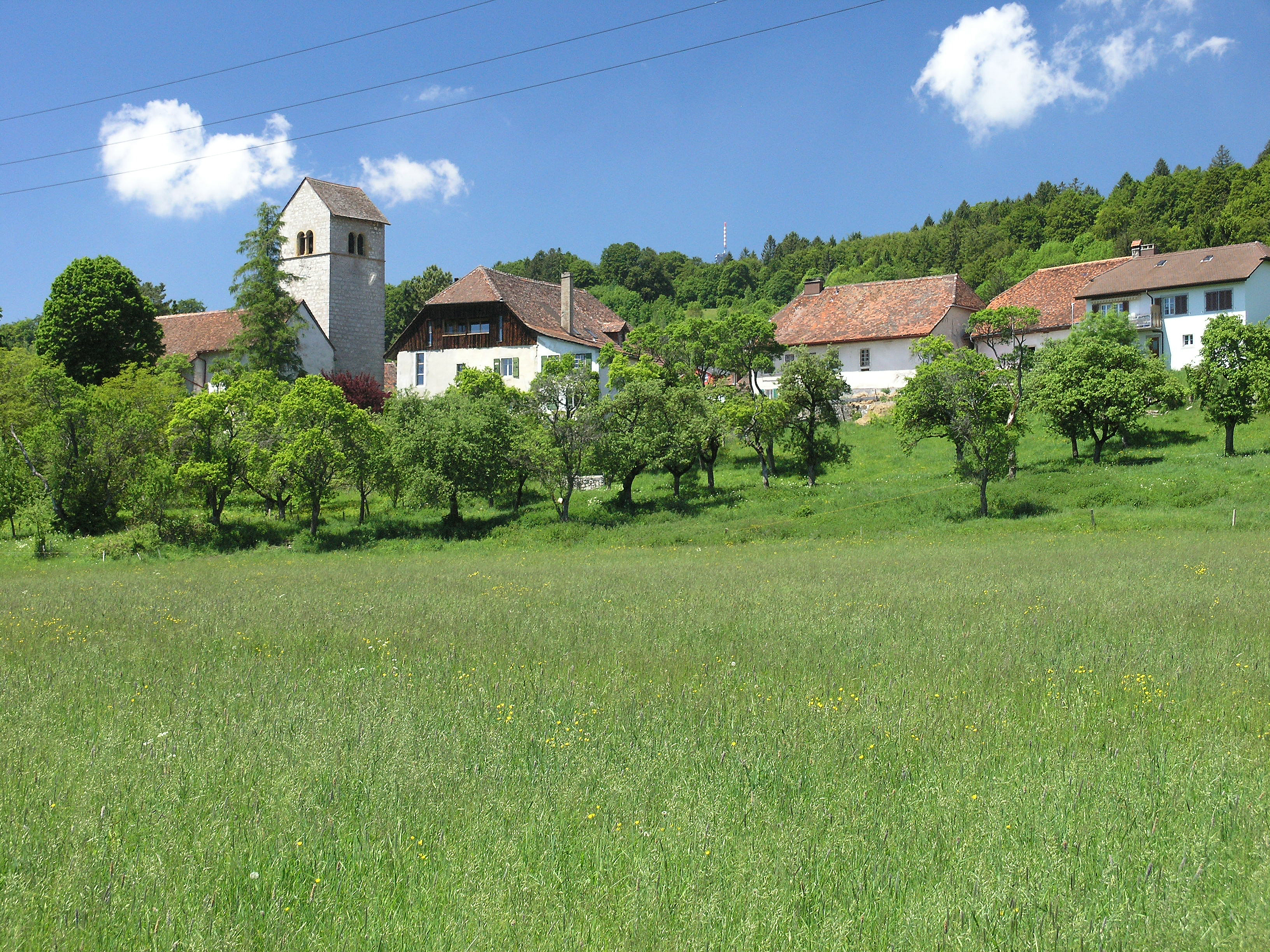 Village de Diesse